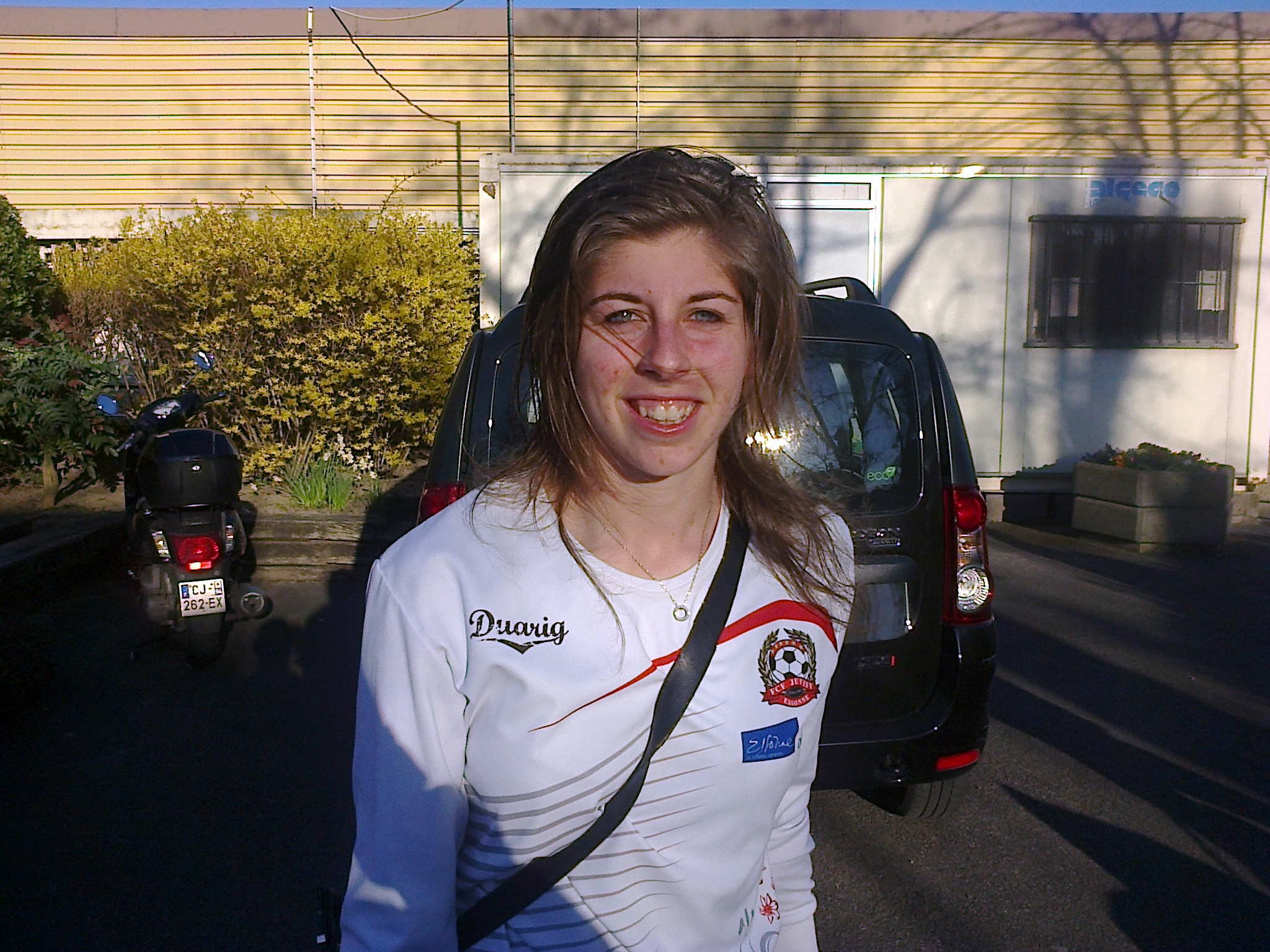 Camille Catala après le match VGA Saint-Maur - Juvisy FCF du 16 mars 2014.